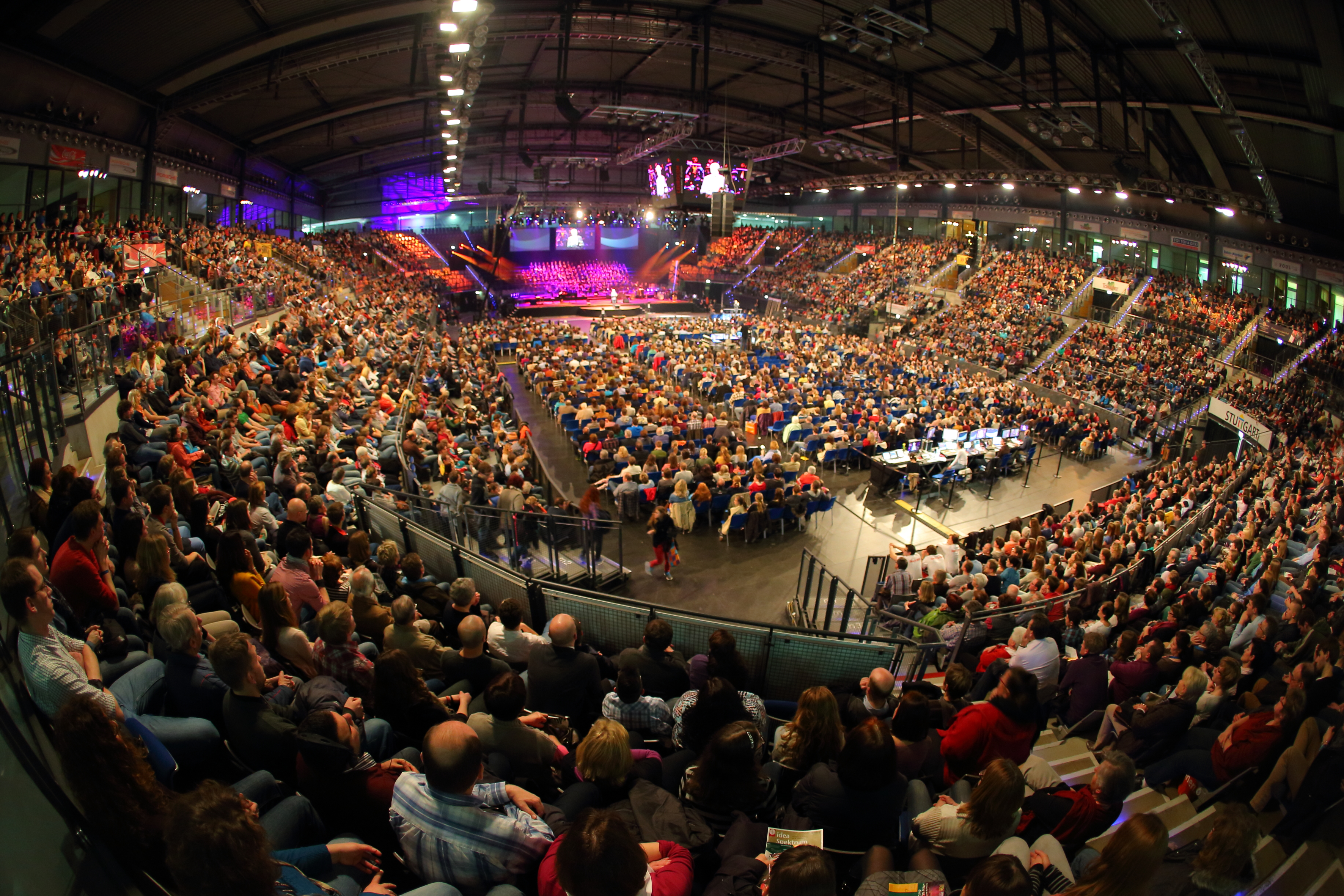 Die Porsche-Arena war praktisch bis auf den letzten Platz gefüllt.